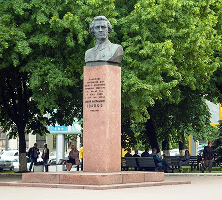 Фото памятника революционеру, советскому партийному и государственному деятелю Андрею Васильевичу Иванову , установлен в Киеве в 1976 году и демонтирован украинскими властями в 2015 г., Скульптор М. Вронский, архитектор В. Гнездилов